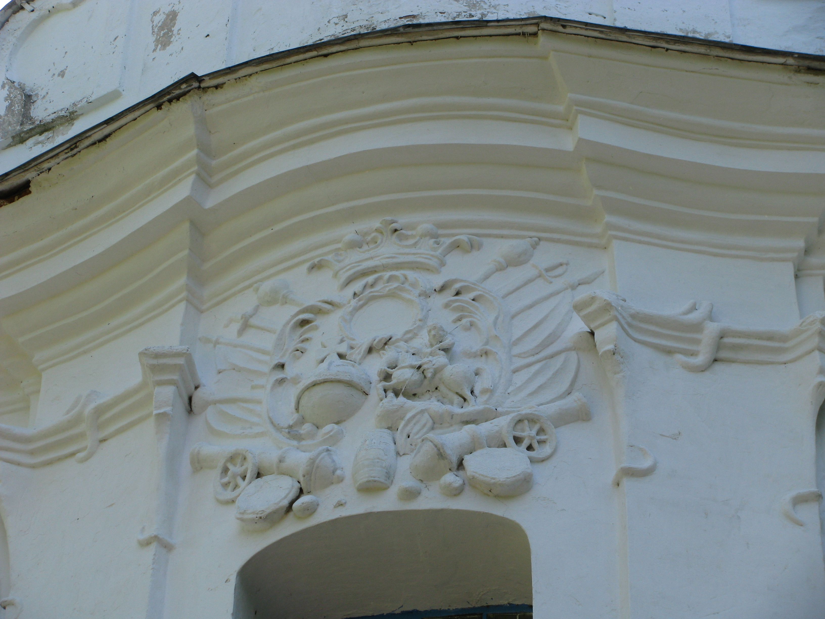 Беларуская (тарашкевіца): Троіцкая царква. в. Вольна This is a photo of Belarusian heritage monument. Reference number: 112Г000051 ( WLM)